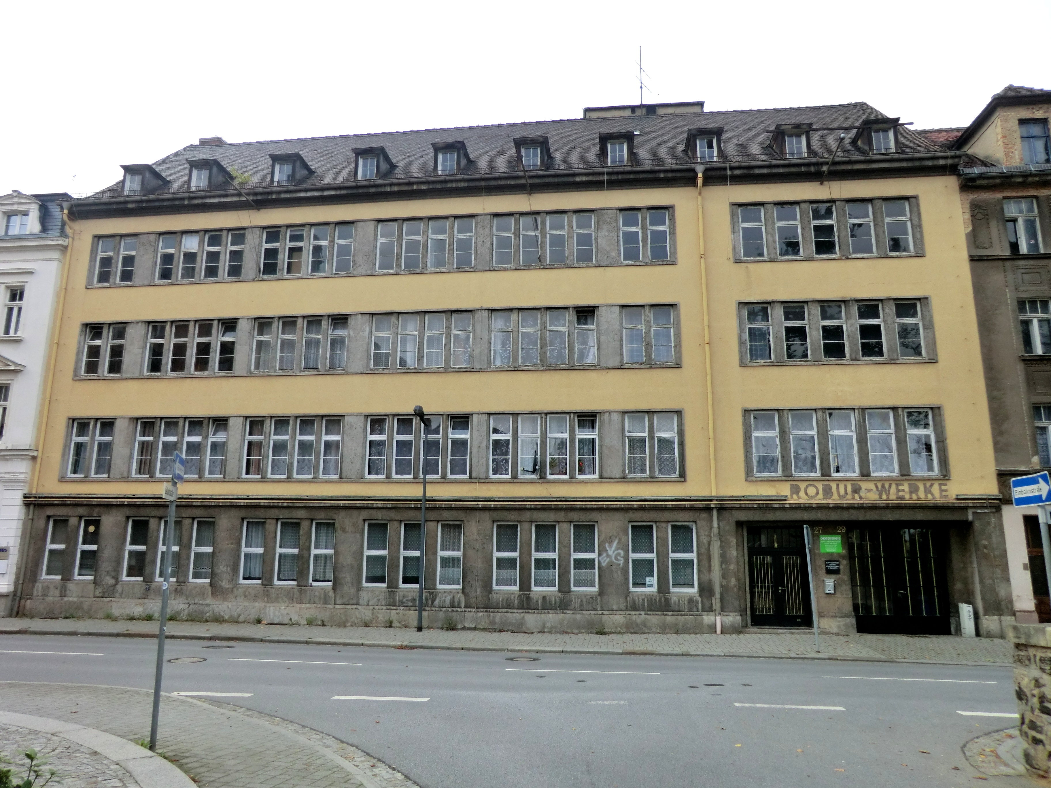 Zittau, Robur-Werke, Bahnhofstraße 27-29